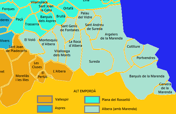 Mapa de l'Albera elaborat a partir d'una mapa de lliure disposició